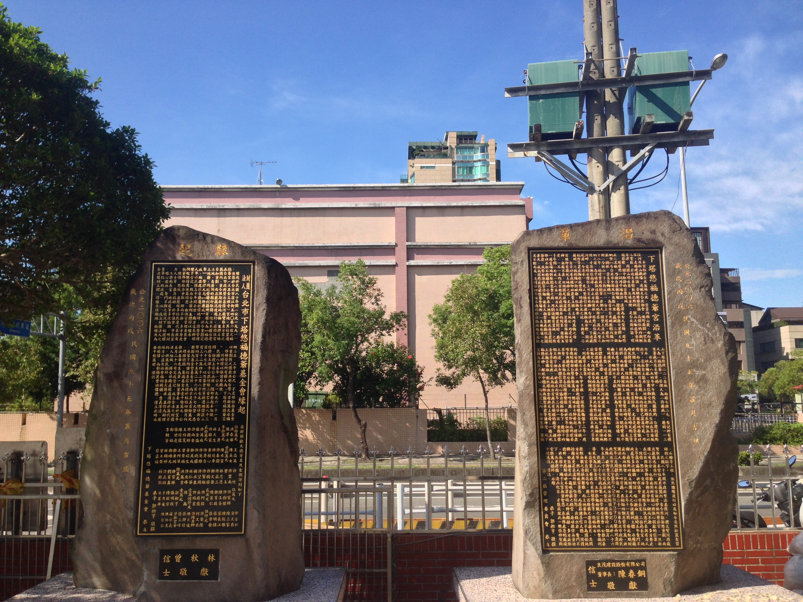 下塔悠福德宮碑